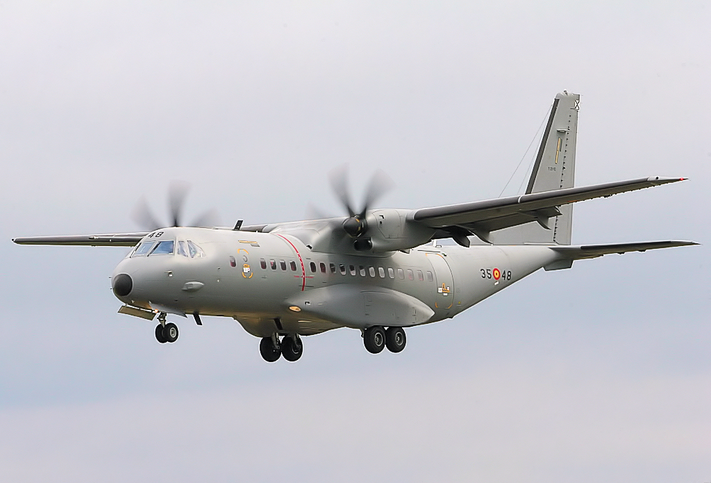 CN295 - RIAT 2007